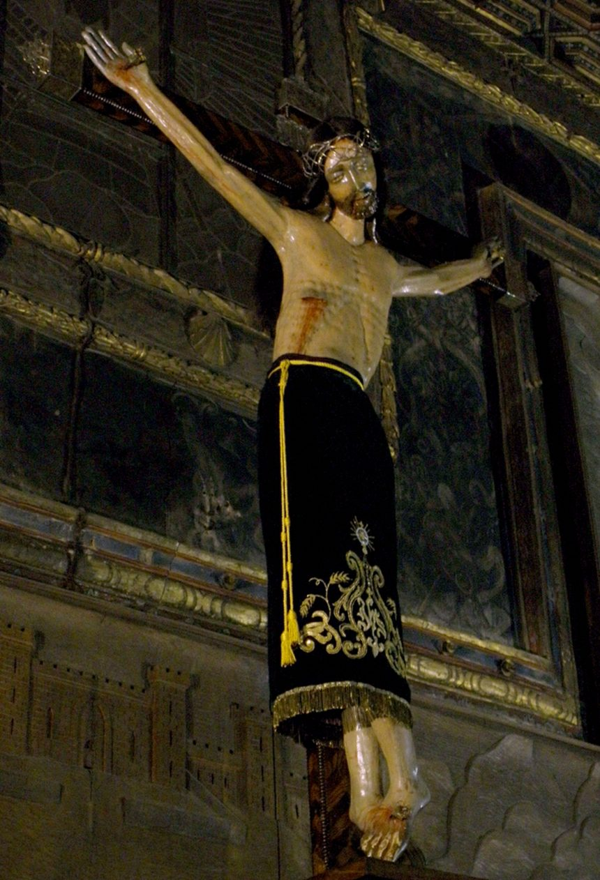 Cristo de los Milagros. Crucificado situado en el coro bajo de la iglesia de Sancti Spiritus de Salamanca